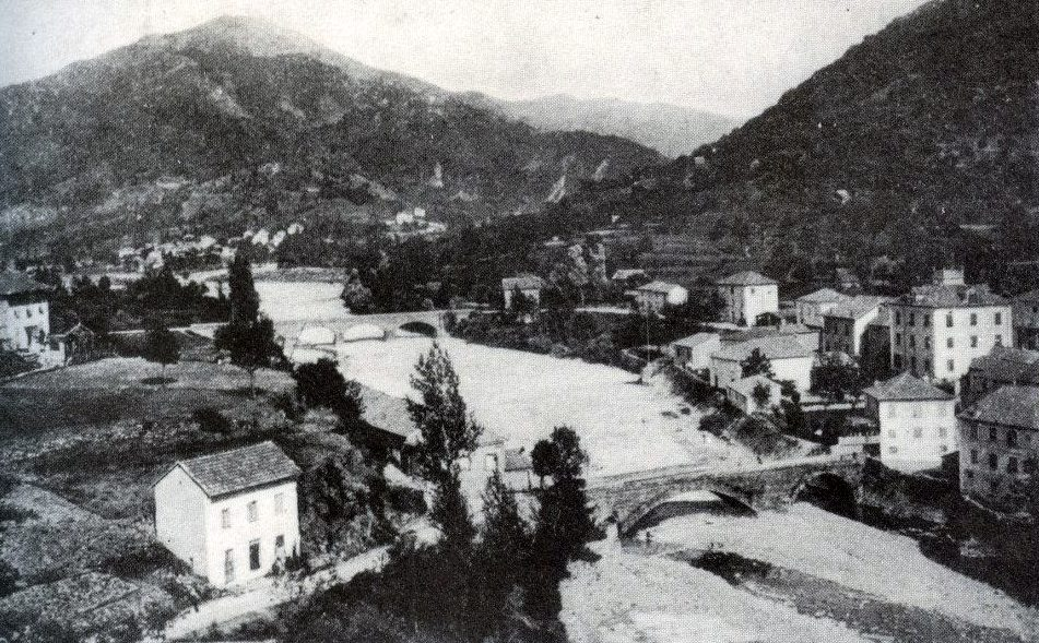 Panorama del 1920 di Montoggio, Liguria, Italia